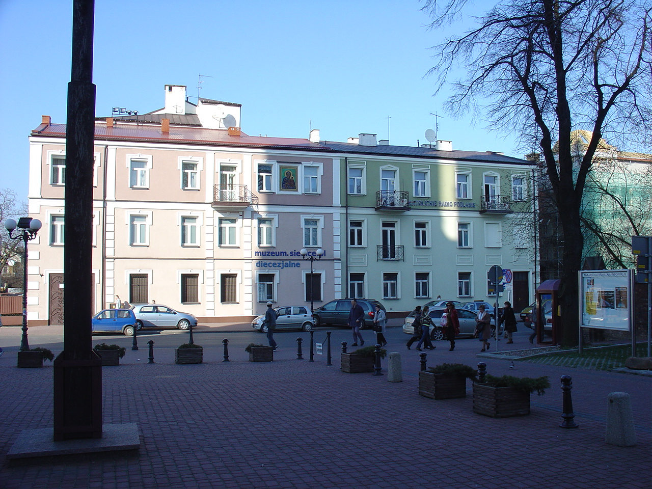 Muzeum Diecezjalne w Siedlcach, siedziba Katolickiego Radia Podlasie